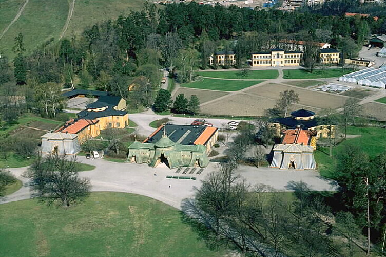 Hagaparken med koppartälten. Motiv: Haga Nyckelord: Byggnadsminnen:Statl, Flygbilder, Riksintressen Kategori: Herrgårds-/slottslandskap Hagaparken med koppartälten.